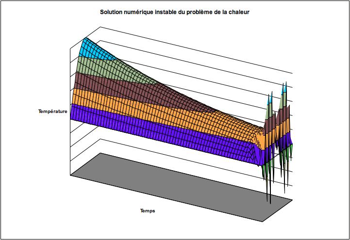 Instabilité numérique d’un schéma aux différences finies explicite pour l'équation de la chaleur, appliqué dans un cas particulier où il est « théoriquement » convergent, mais instable